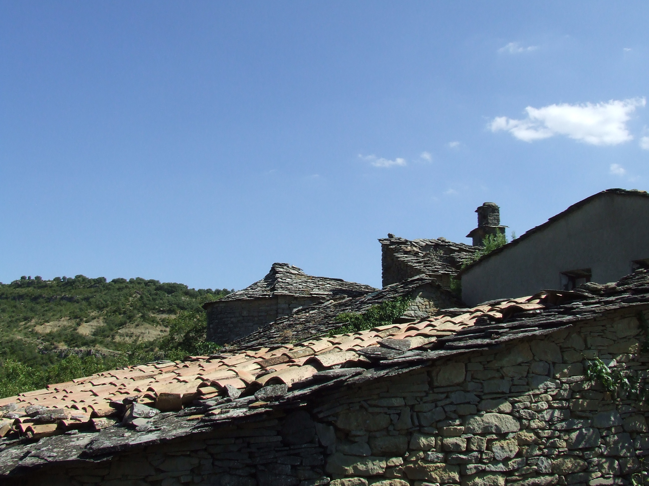 Sant Martí del Meüll (Mur, Castell de Mur, Pallars Jussà)